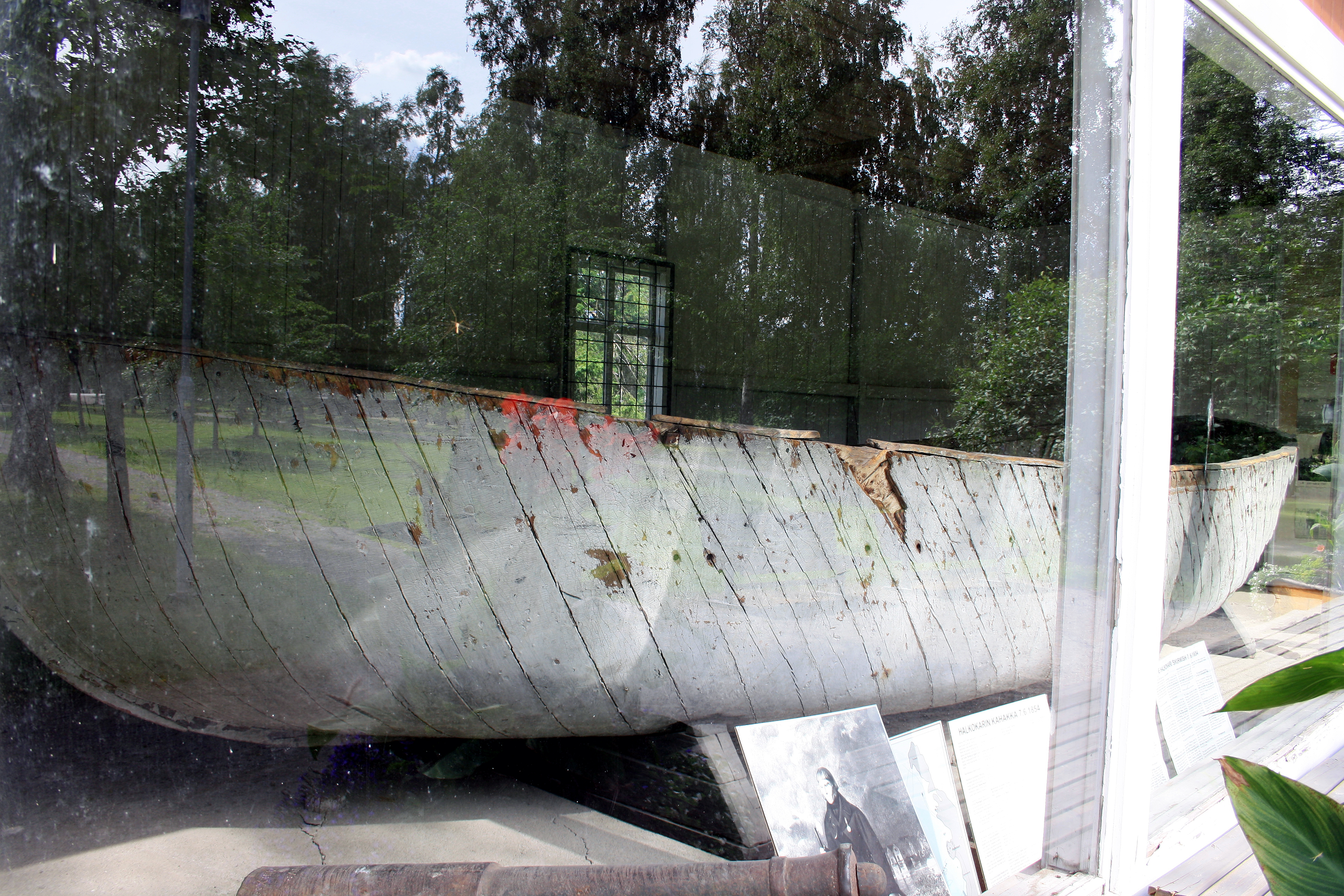 Englantilainen laivavene, barkassi, Kokkolassa.